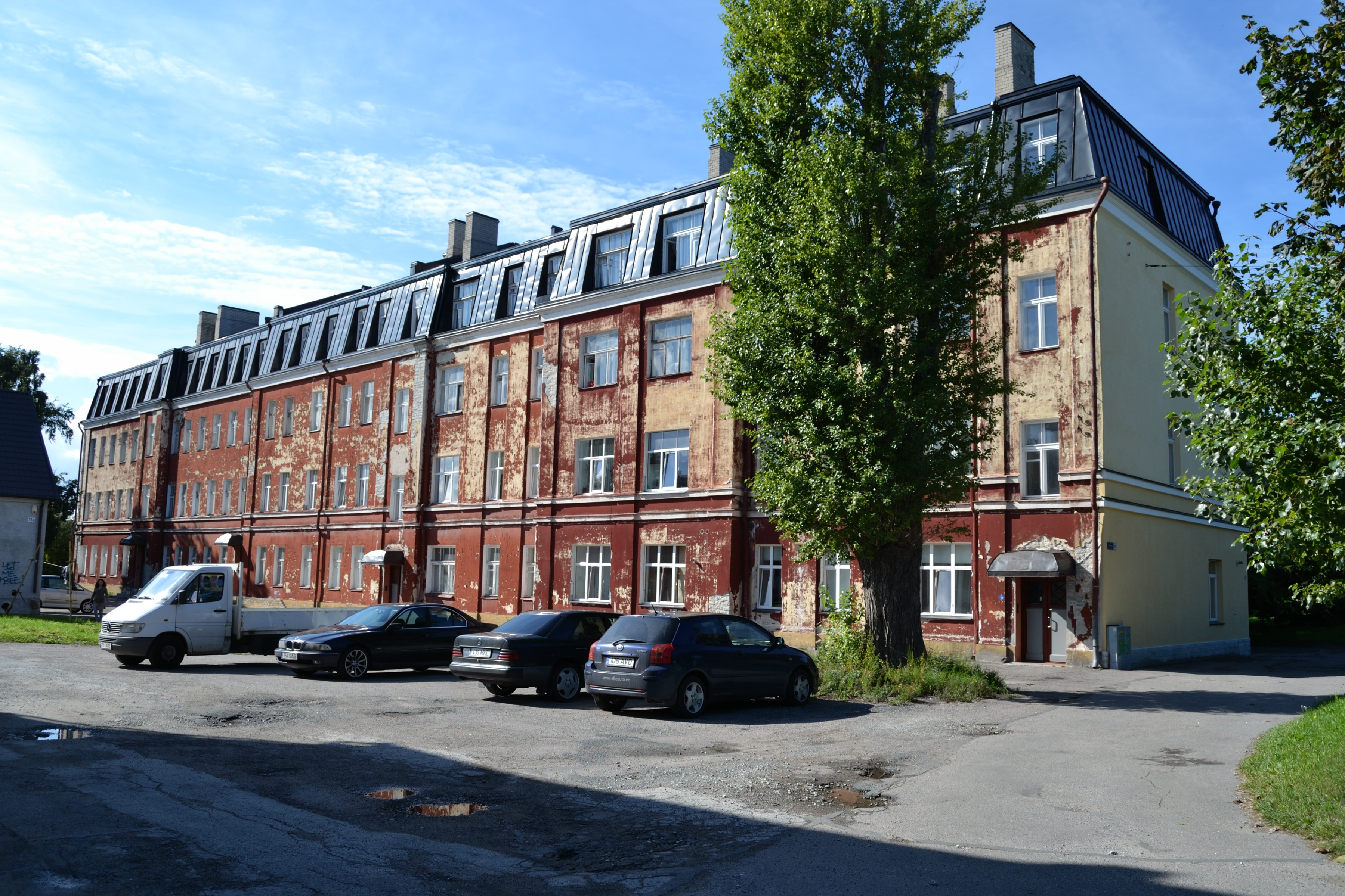 Tallinn, Bekkeri laevatehase inseneride elamu, 1912-1914